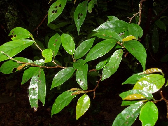 Antidesma japonicum var densiflorum